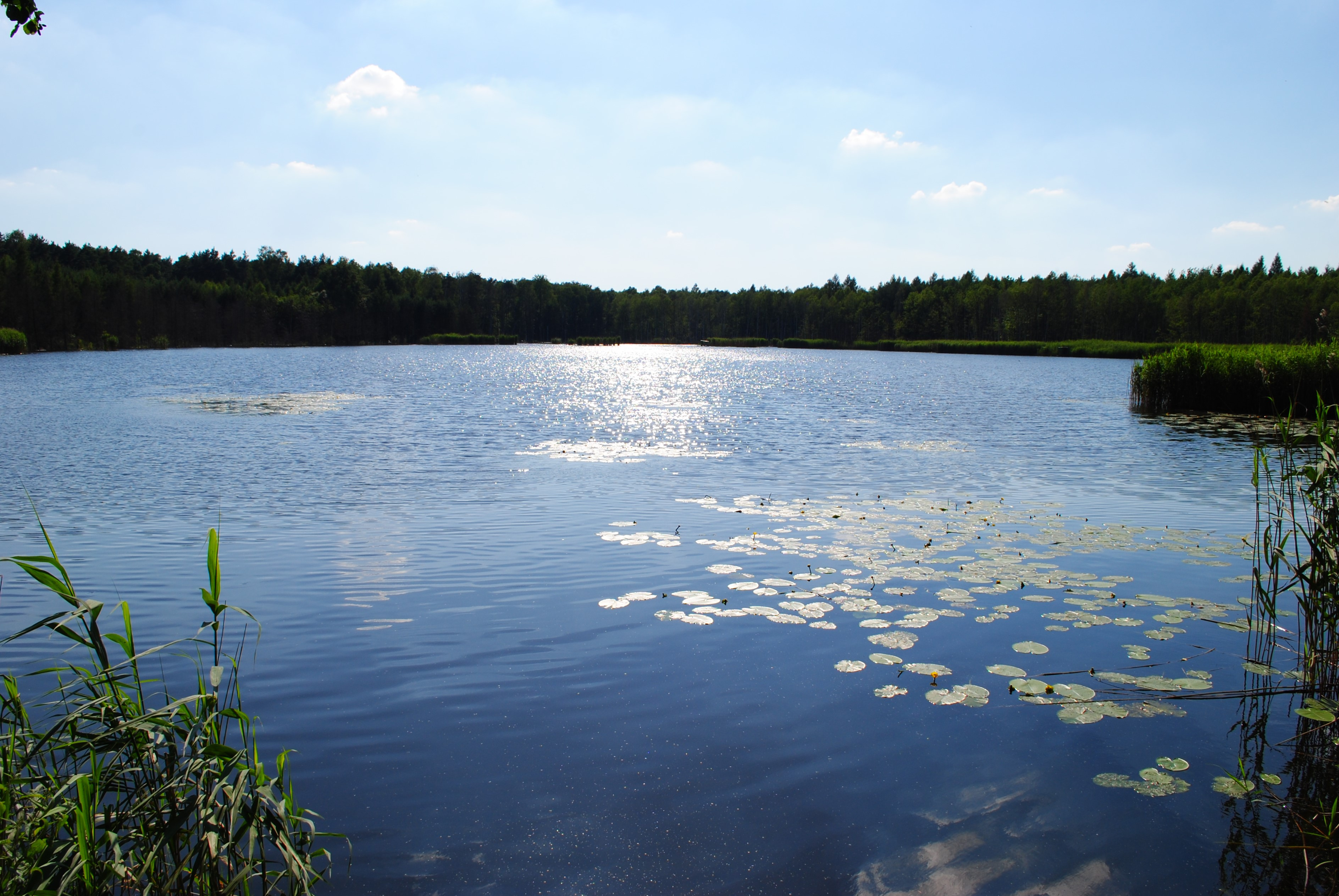 Katowice-Giszowiec. Staw Barbara